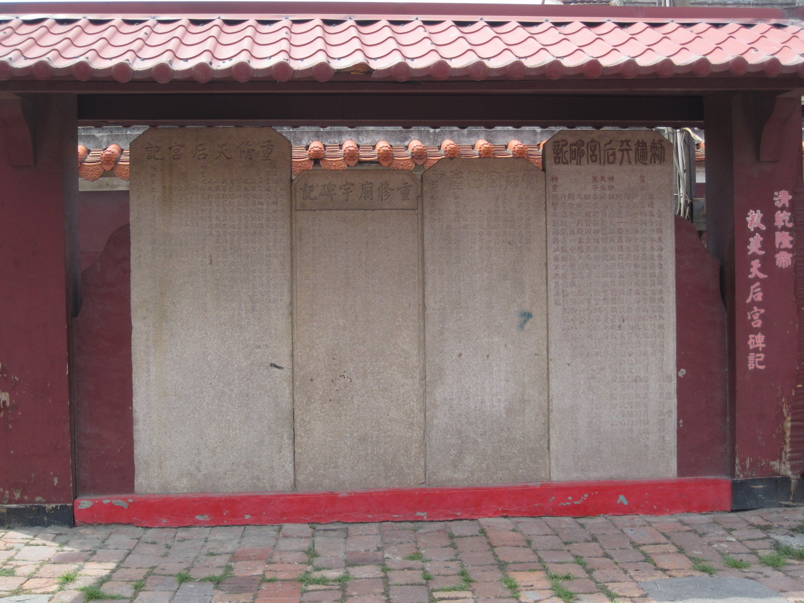 鹿港新祖宮的石碑。